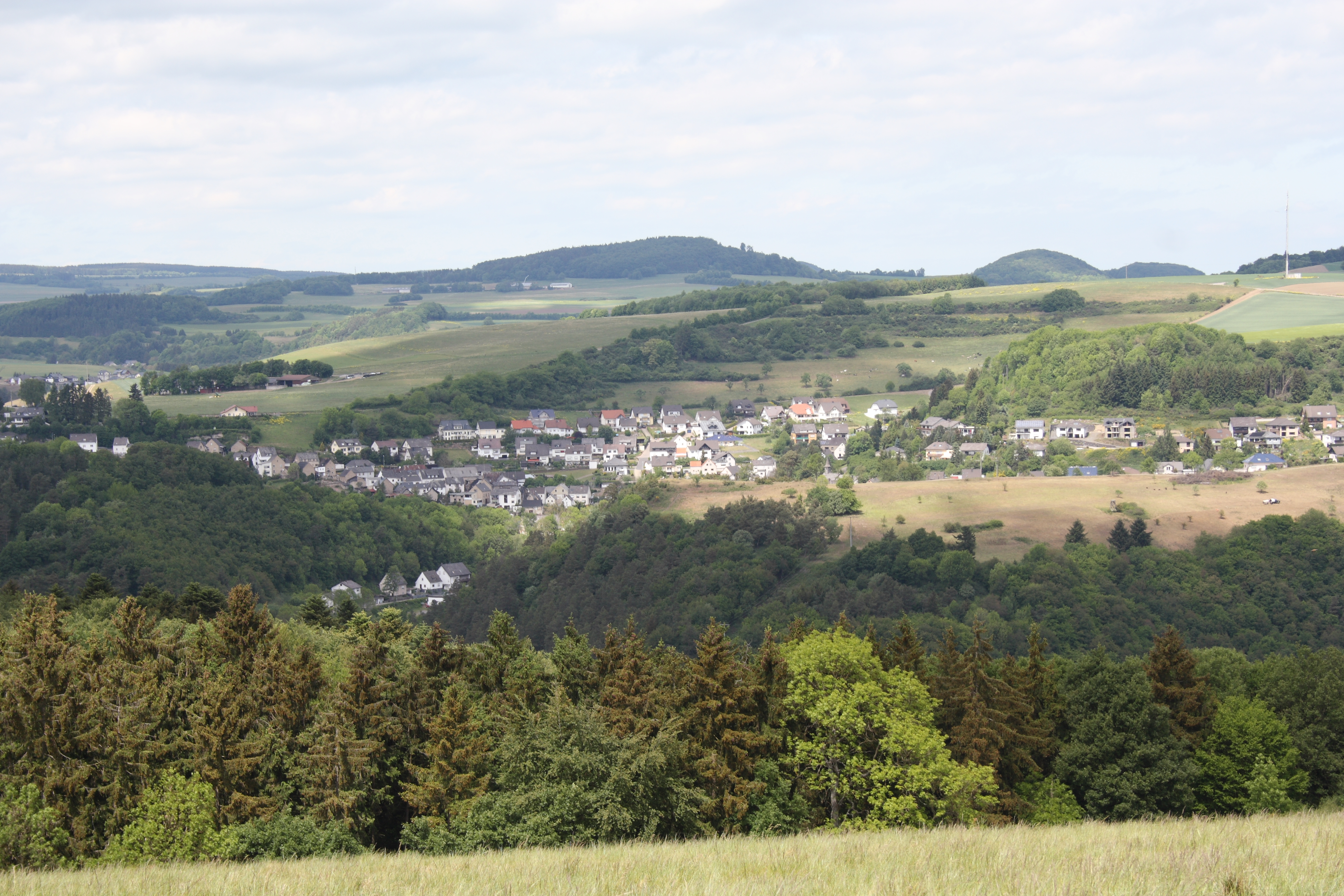 Rieden (Eifel) von Kirchwad aus gesehen